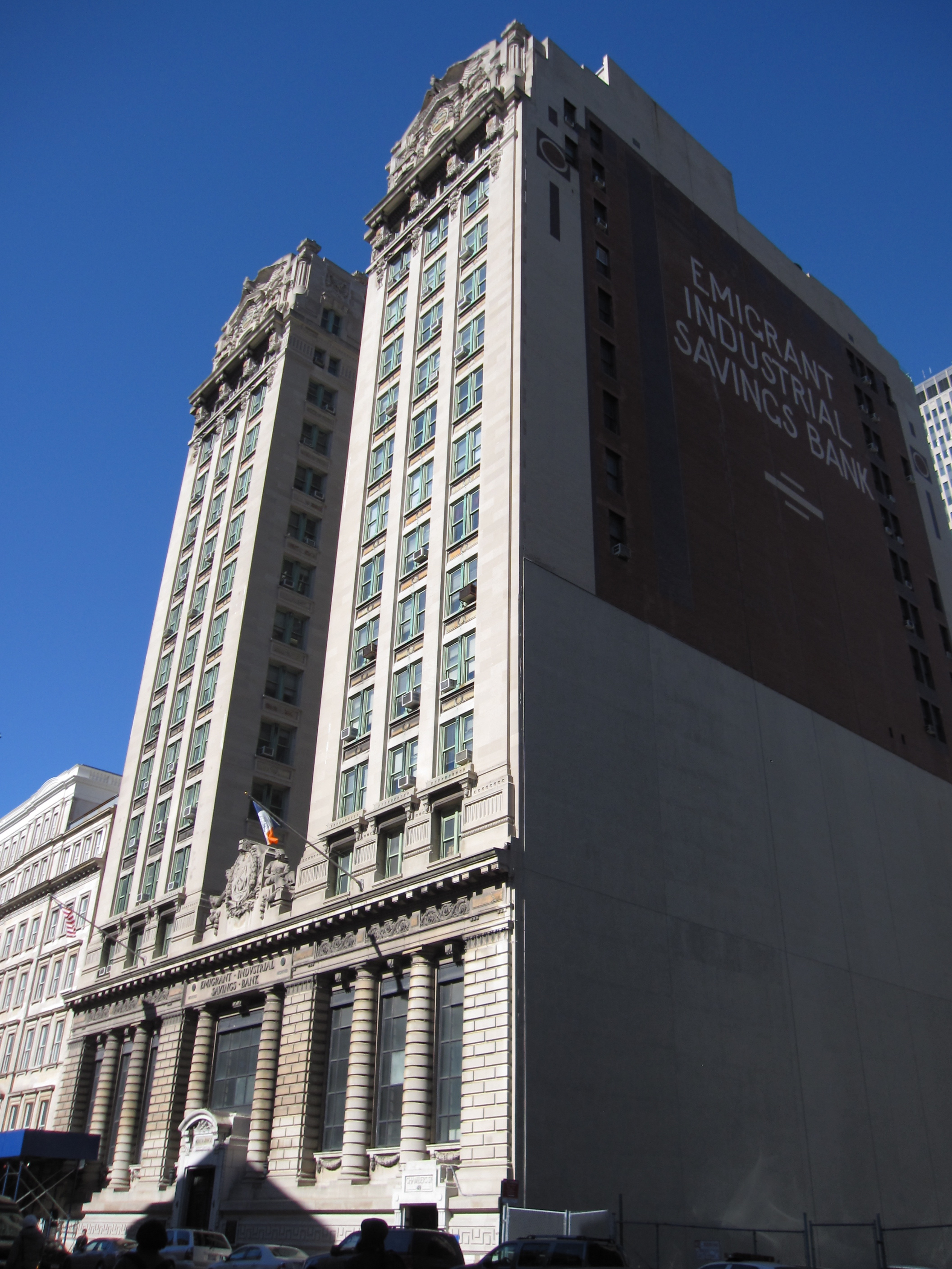 Emigrant Industrial Savings Bank